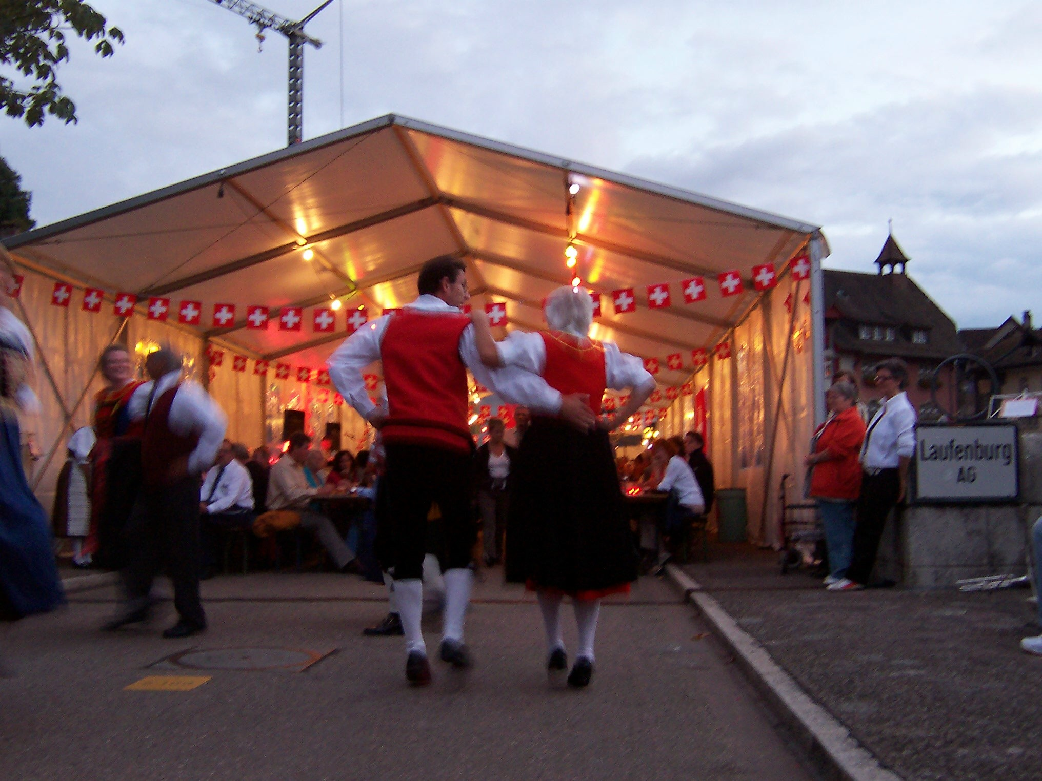 „Volkstanzgruppe Laufenburg“/D an der grenzüberschreitenden 1.August-Feier auf der Alten Rheinbrücke von Laufenburg in Aargau/CH und Baden-Württemberg/D